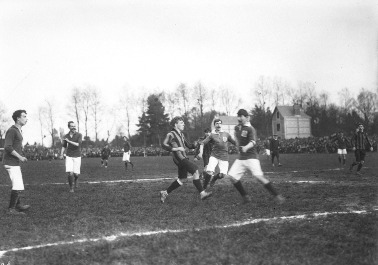 Rouen, finale du championnat de France USFSA, FC Rouen contre SH Marseille sur le terrain du Grand Trianon.